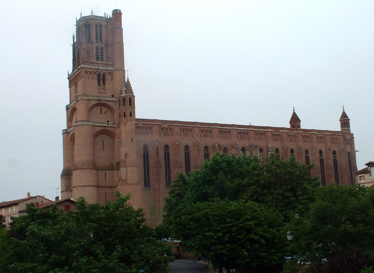 Cathédrale Sainte-Cecile d'Albi